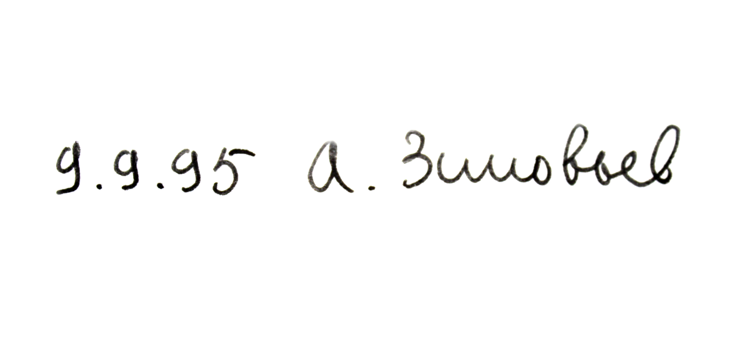 Автограф писателя А. Зиновьева